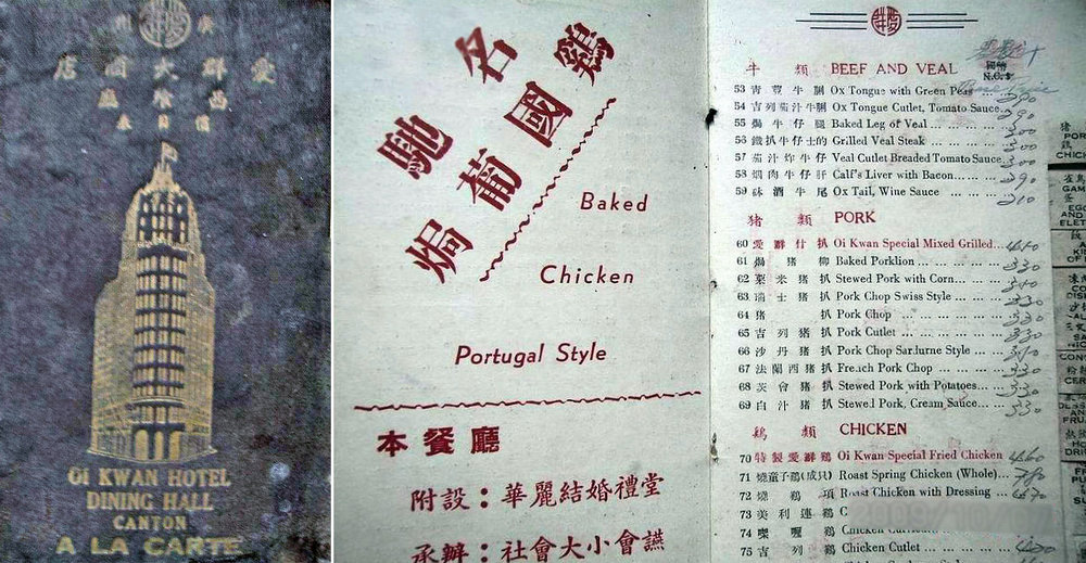 中華民國大陸時期的廣州市愛羣大酒店西餐廳價目表（菜牌）。